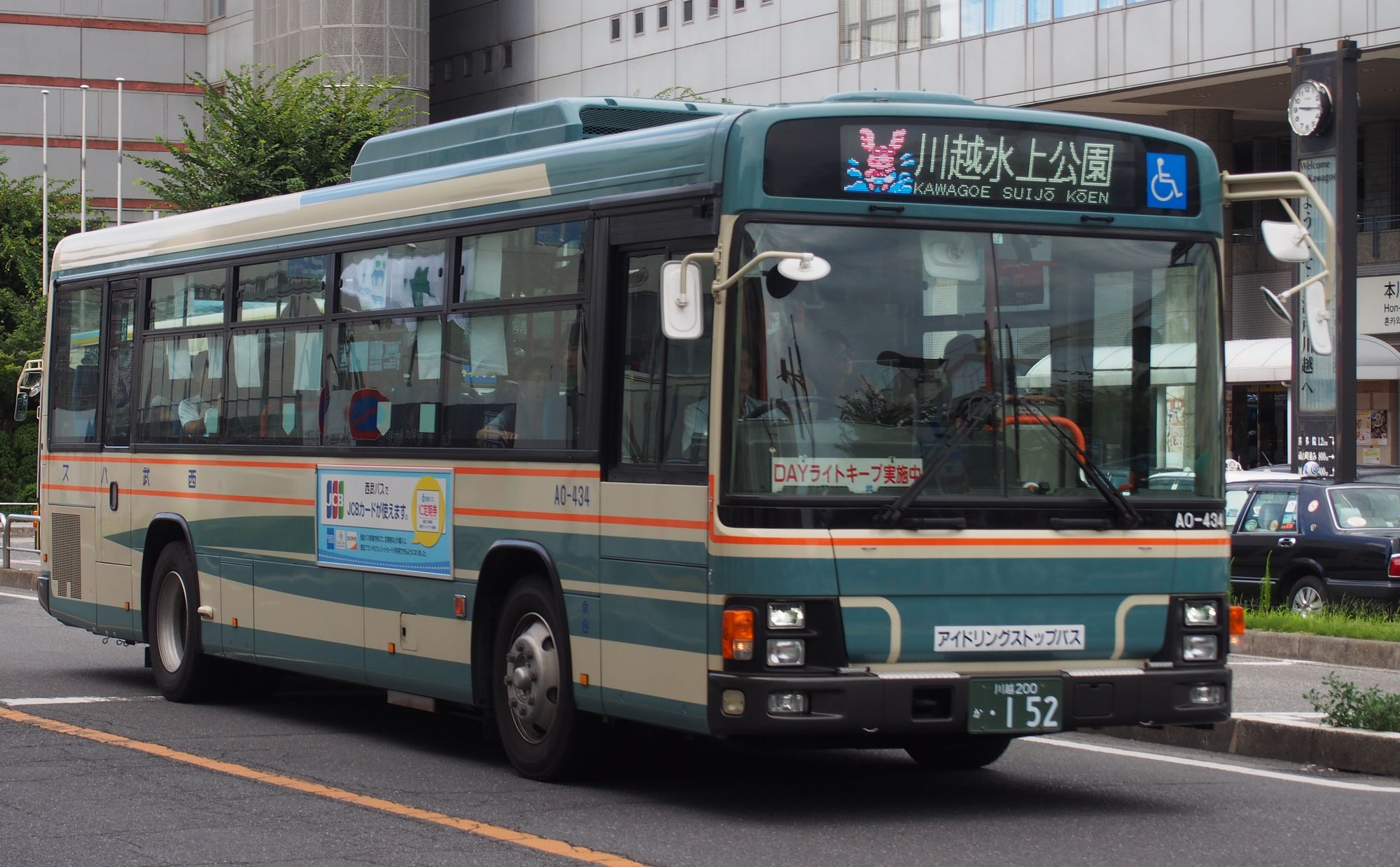 川越100 川越水上公園行き